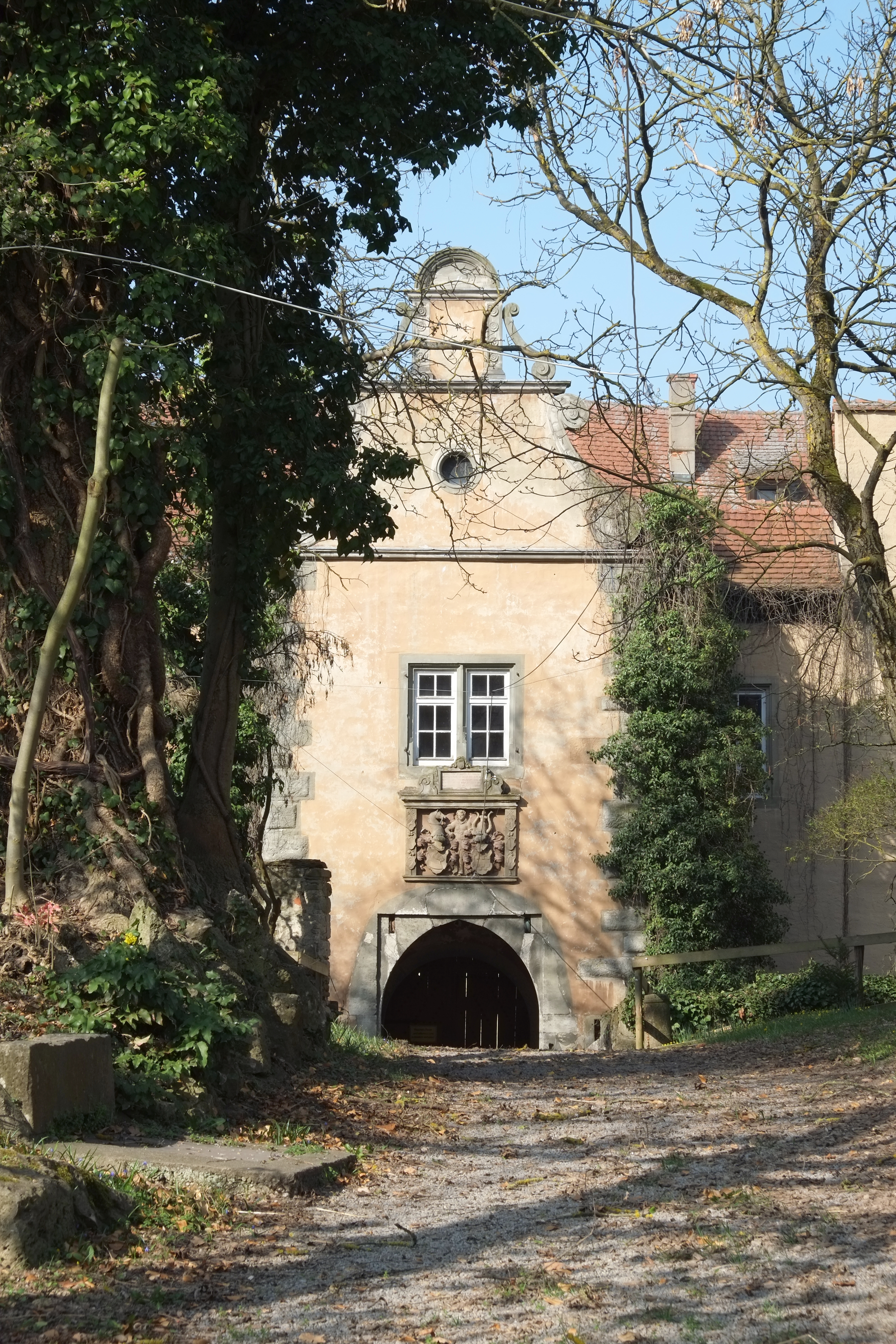 Wasserschloss in Giebelstadt im Landkreis Würzburg (Bayern, Deutschland)